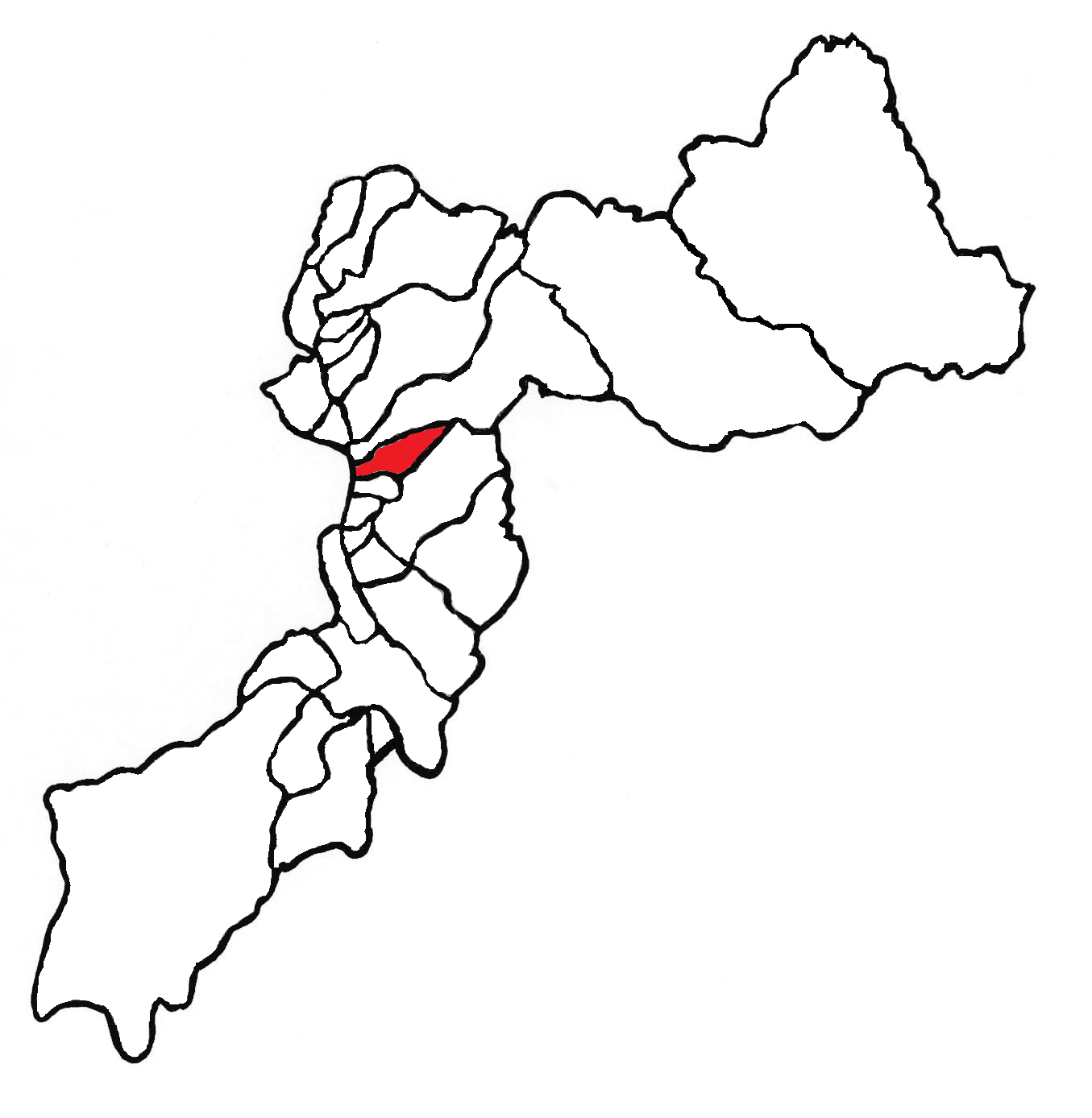 Ubicación del distrito en la provincia de Huancayo, departamento de Junín, Perú